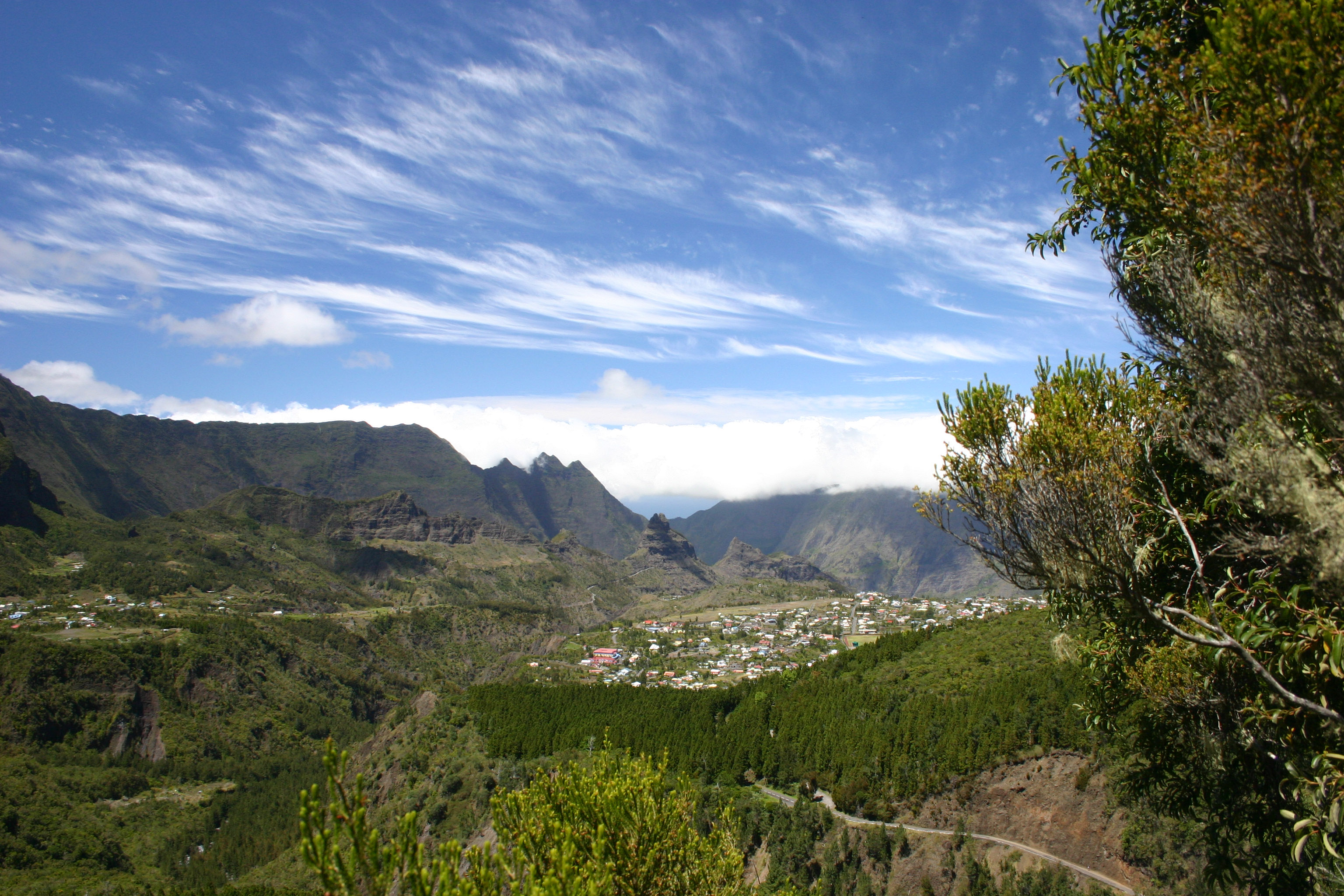 Cilaos La ville de Cilaos dans le cirque éponyme, vue depuis le GR-R1 qui descend du Piton des Neiges. C'est par ce chemin de randonnée escarpé que les gramoun passaient autrefois pour célébrer l'Ascension, au sommet du Piton. C'est aujourd'hui interdit pour des raisons de sécurité...